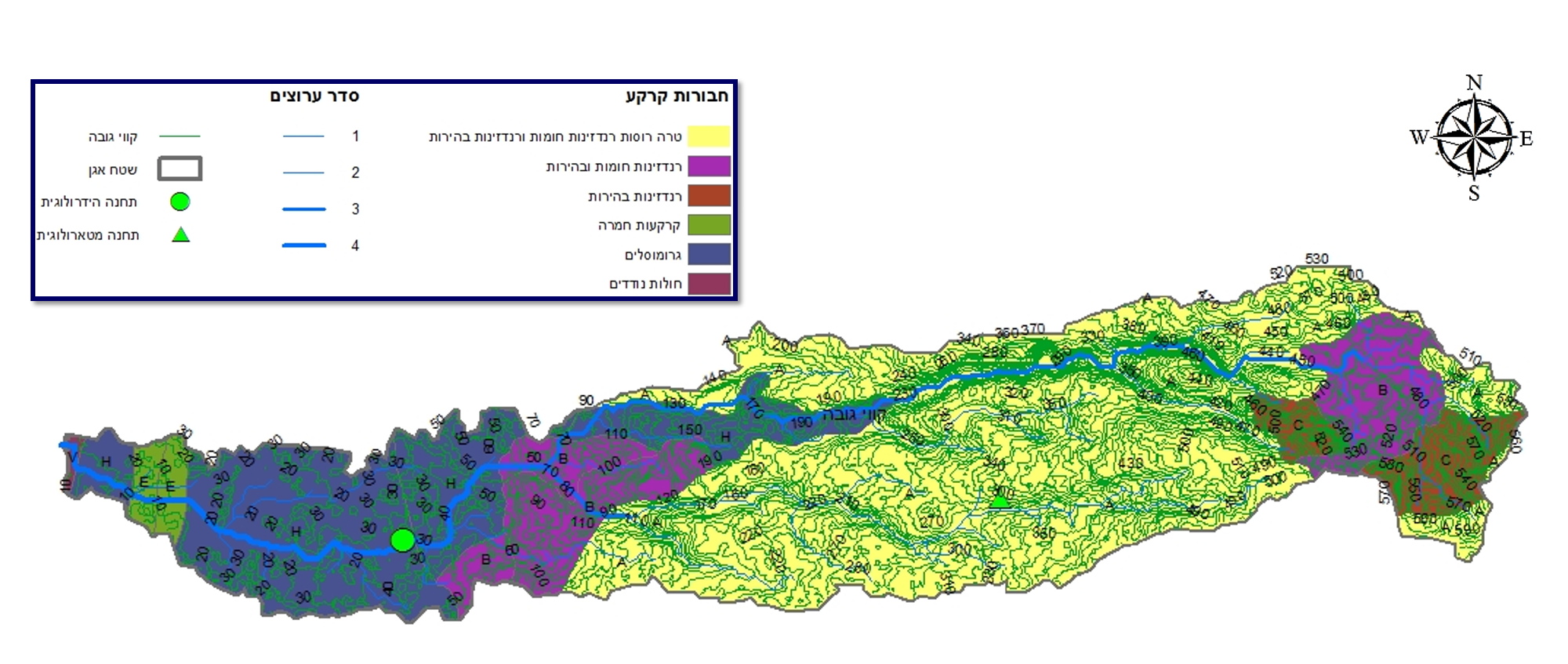 מפת קרקעות ורשתות ניקוז - אגן הגעתון